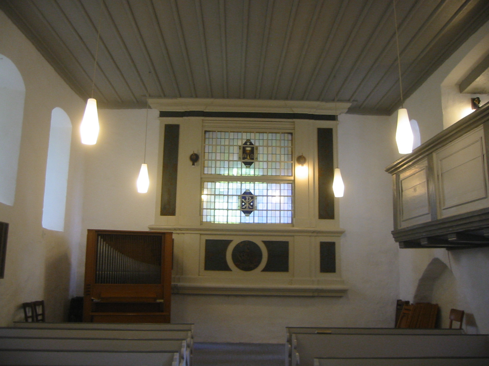 Patronatsloge der Dorfkirche in Ruhlsdorf, ein Feldsteinbau aus dem 13. Jahrhundert in Teltow (Stadt), Potsdam-Mittelmark, Brandenburg